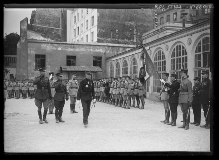 Réception des cadets à Polytechnique 1 photogr. nég. sur verre ; 13 x 18 cm (sup.)